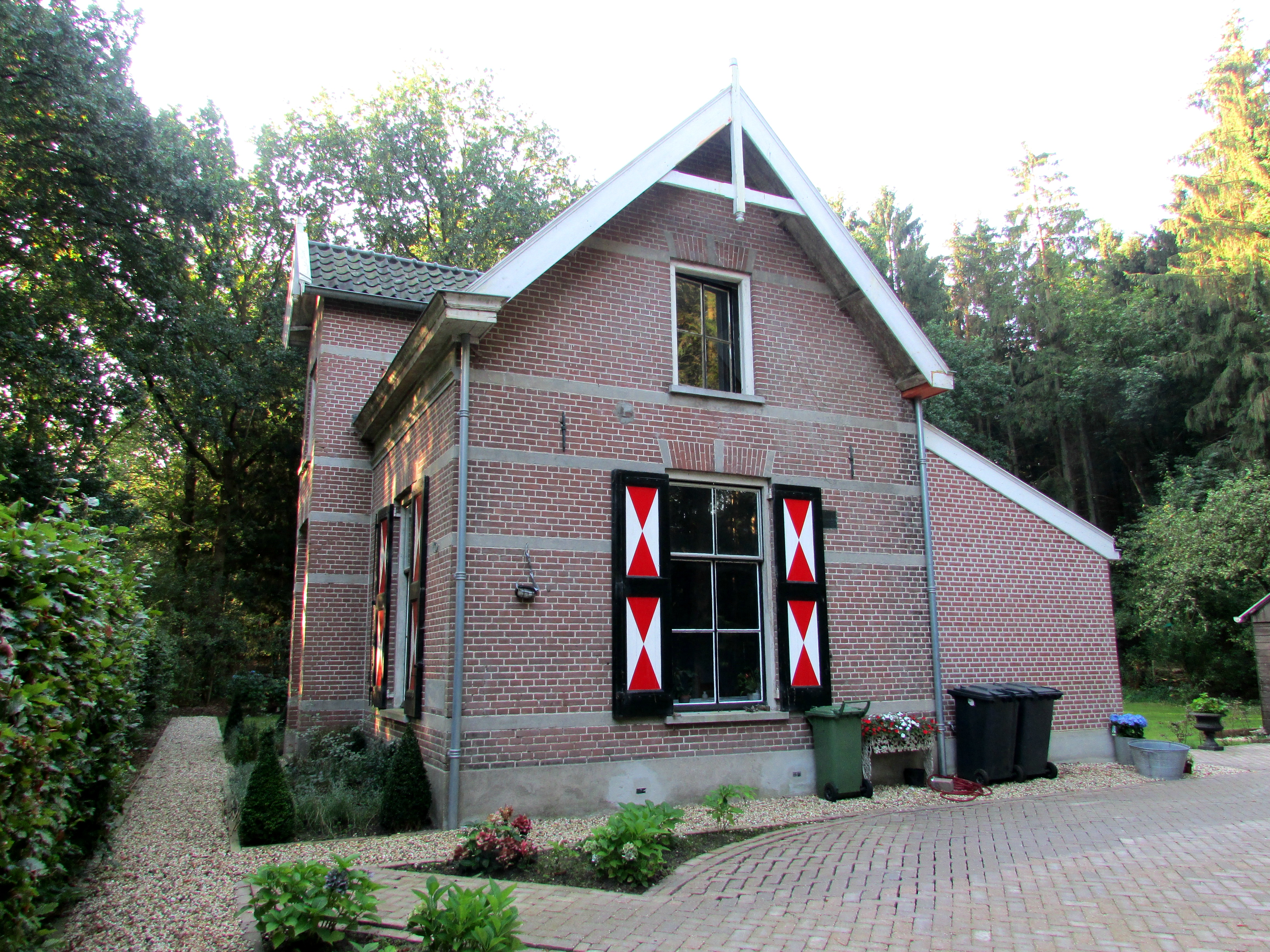 Hoge Vuurseweg 3 Lage Vuursche dienstwoning Klein Drakestein.